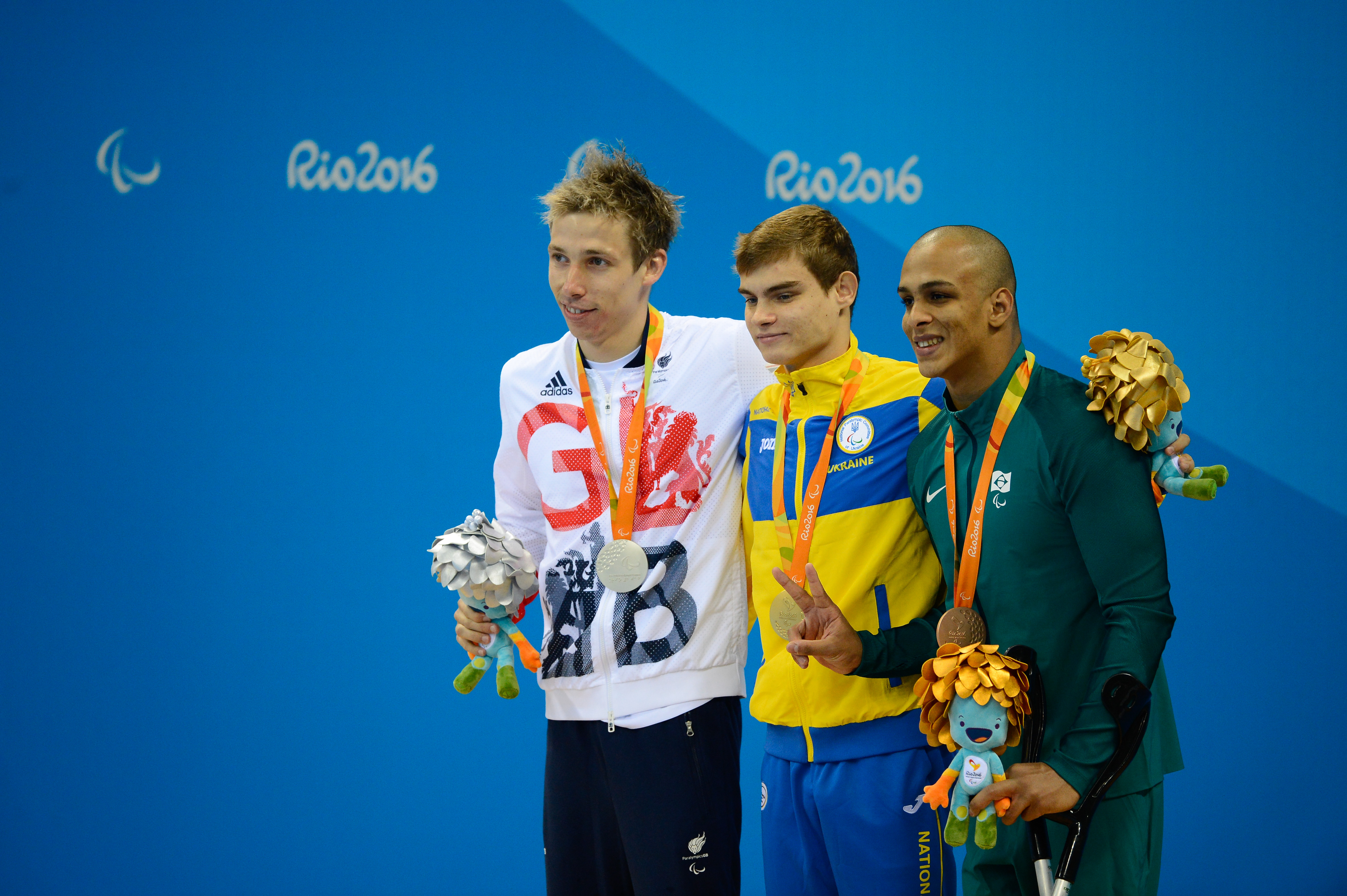 Rio de Janeiro - Brasileiro Italo Pereira ganha medalha de bronze nos 100m nado costas S7 nos Jogos Paralímpicos Rio 2016, no Estádio Aquático